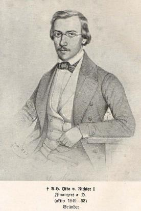 Otto von Richter (1828-1895)